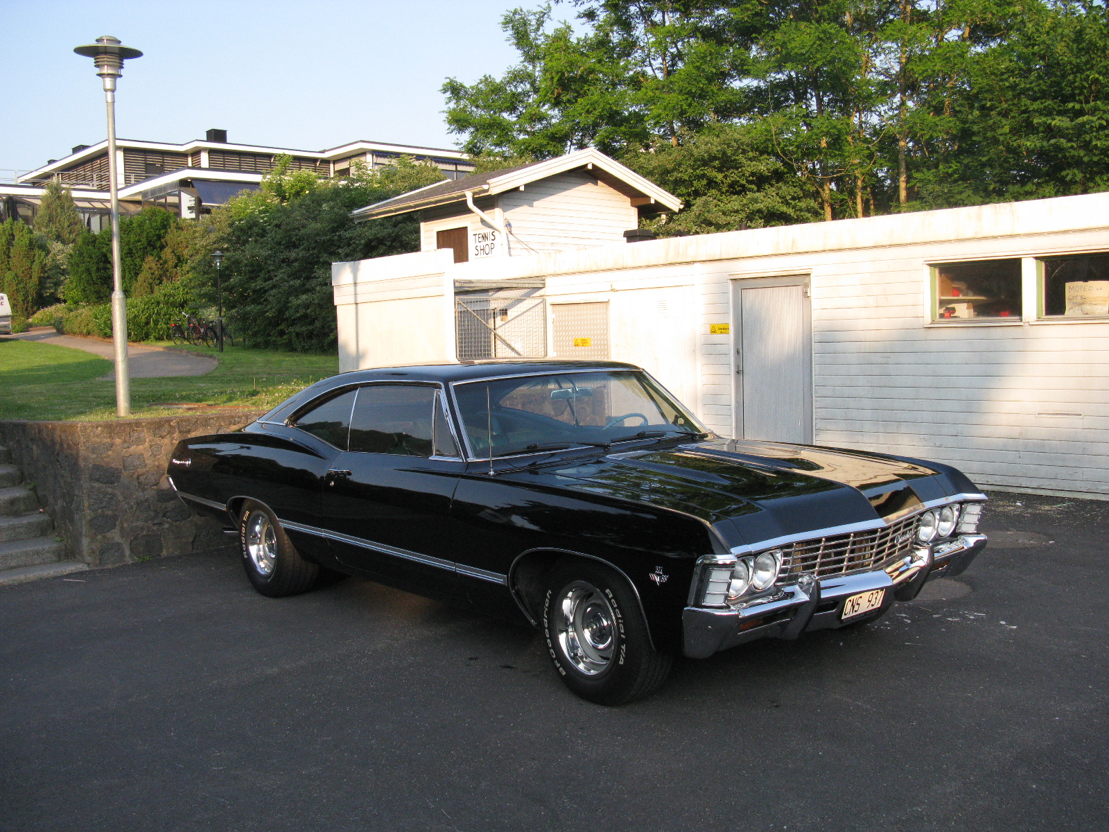 Chevrolet Impala 1967